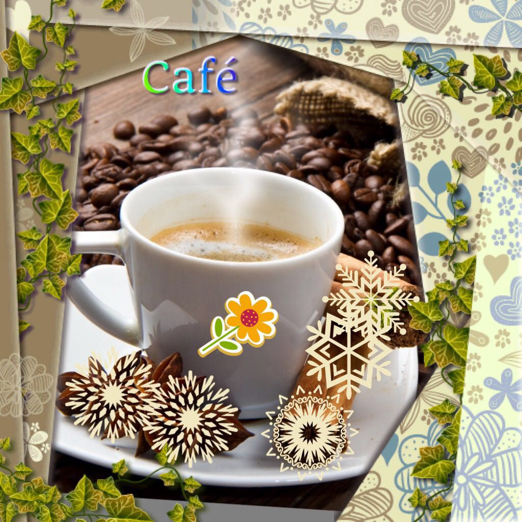 La representación muestra el grano de café con su respectivo producto elaborado..